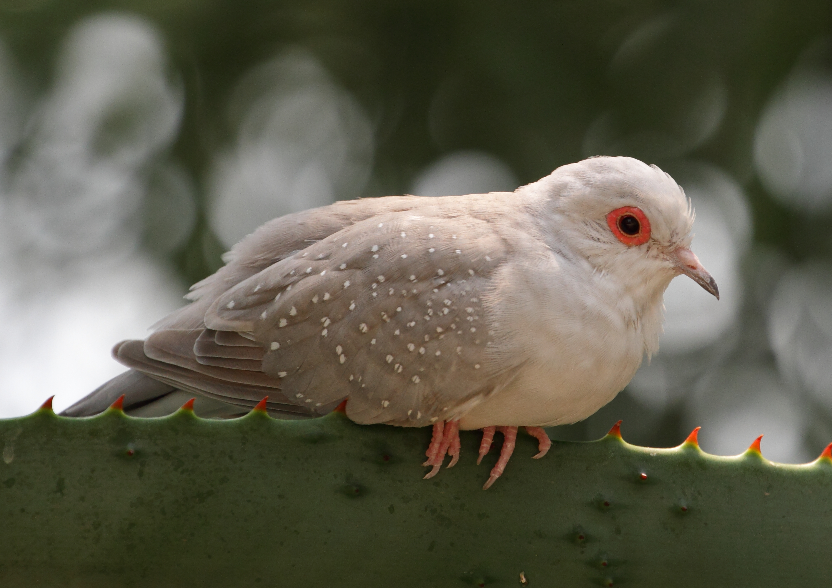 Ein Diamanttäubchen im Wüstenhaus.